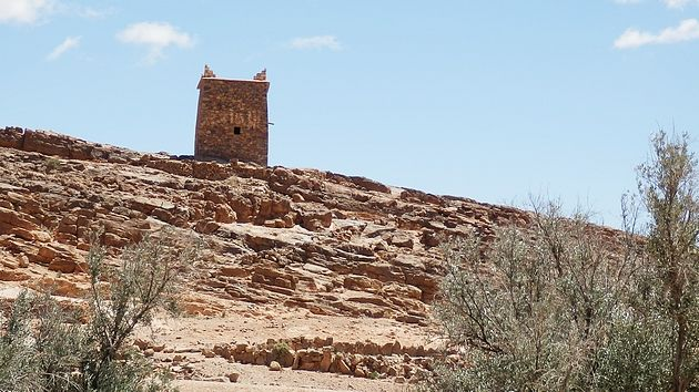 Wachturm